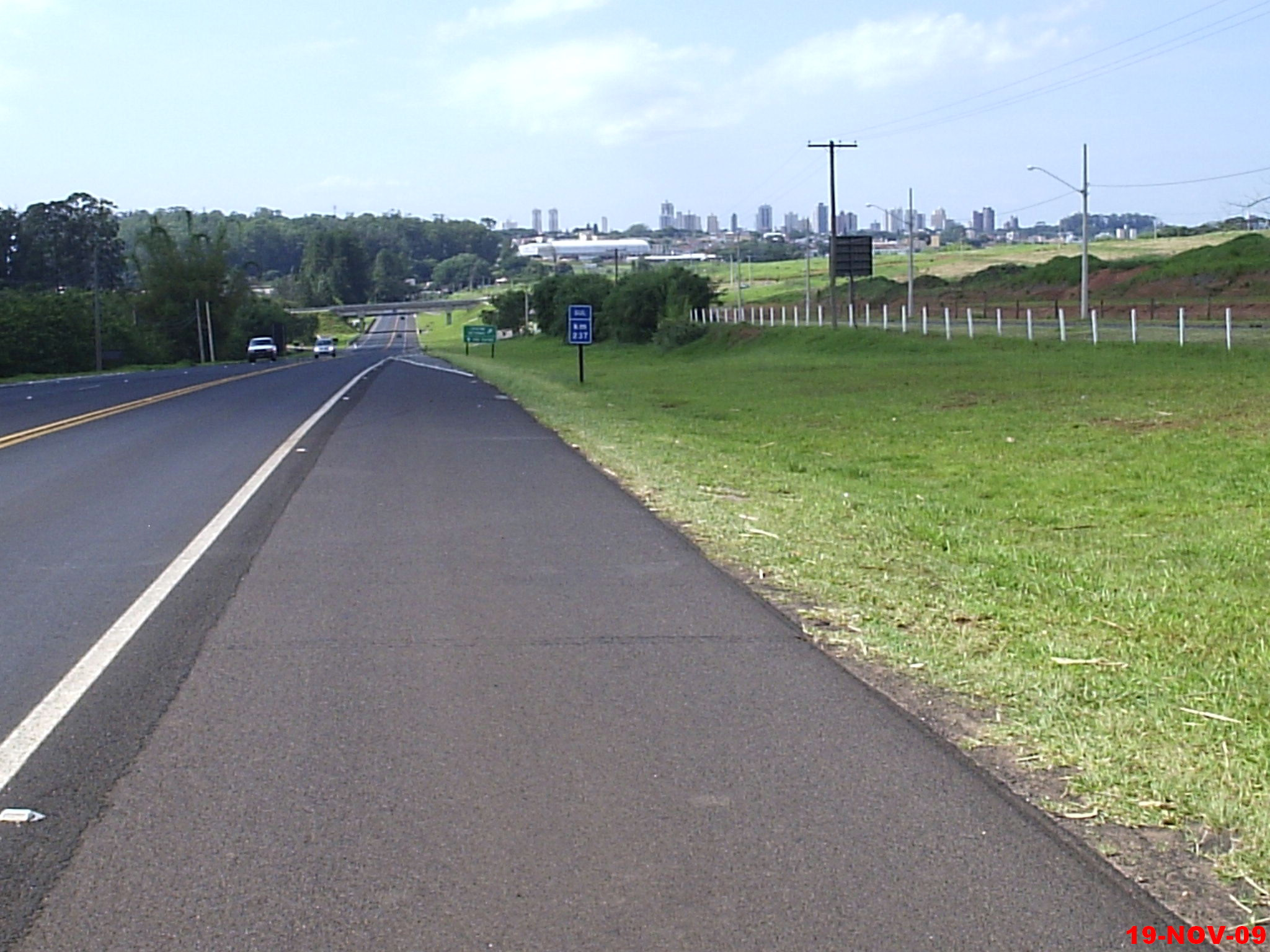 Vista da Cidade de São Carlos da SP-318 - Rodovia Eng.Thales de Lorena Peixoto Jr.